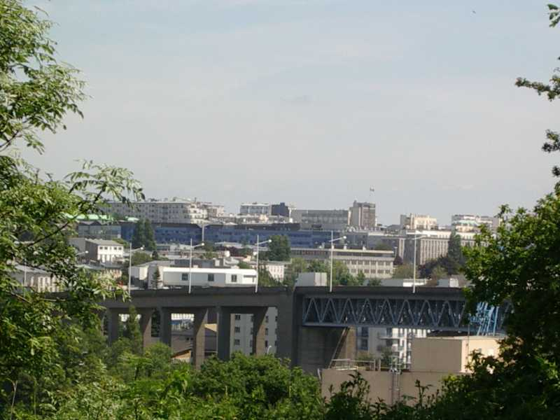 Pont de l'Harteloire vu du côté du quartier de Quéliverzan.